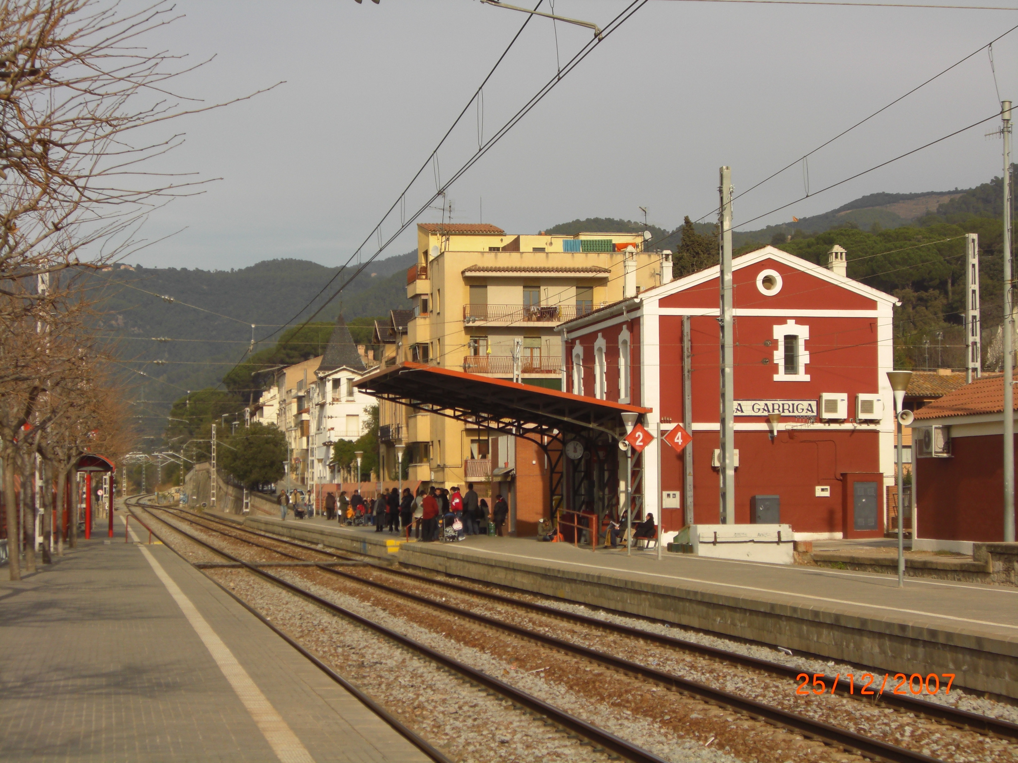 Estació de ferrocarril de la Garriga (Vallès Oriental).